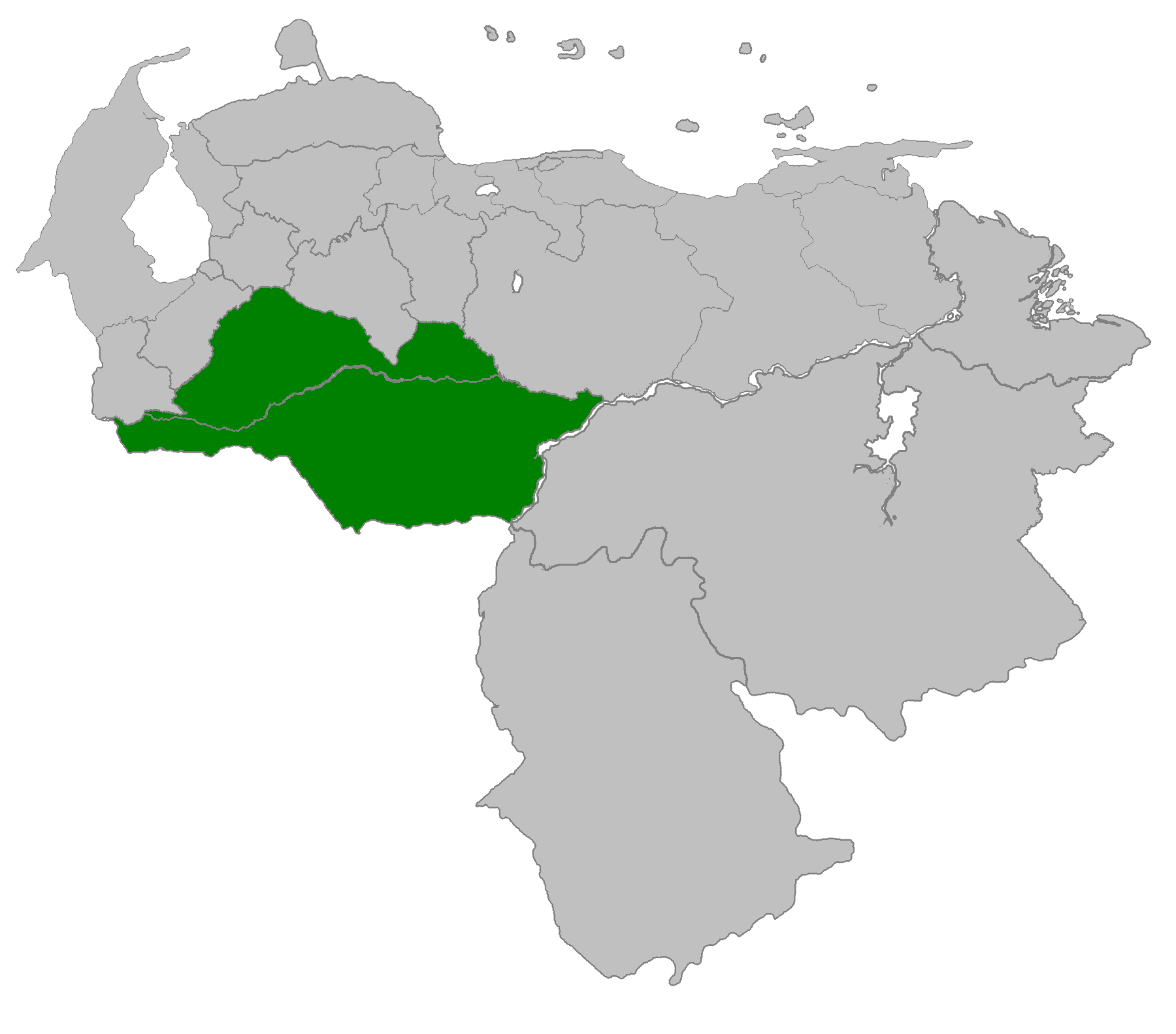 Provincia de Barinas 1786 - 1830